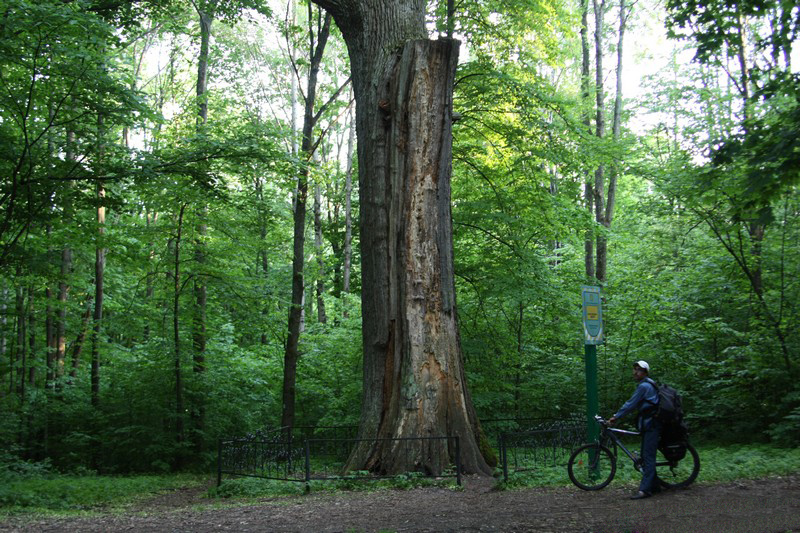 Рихлівська дача